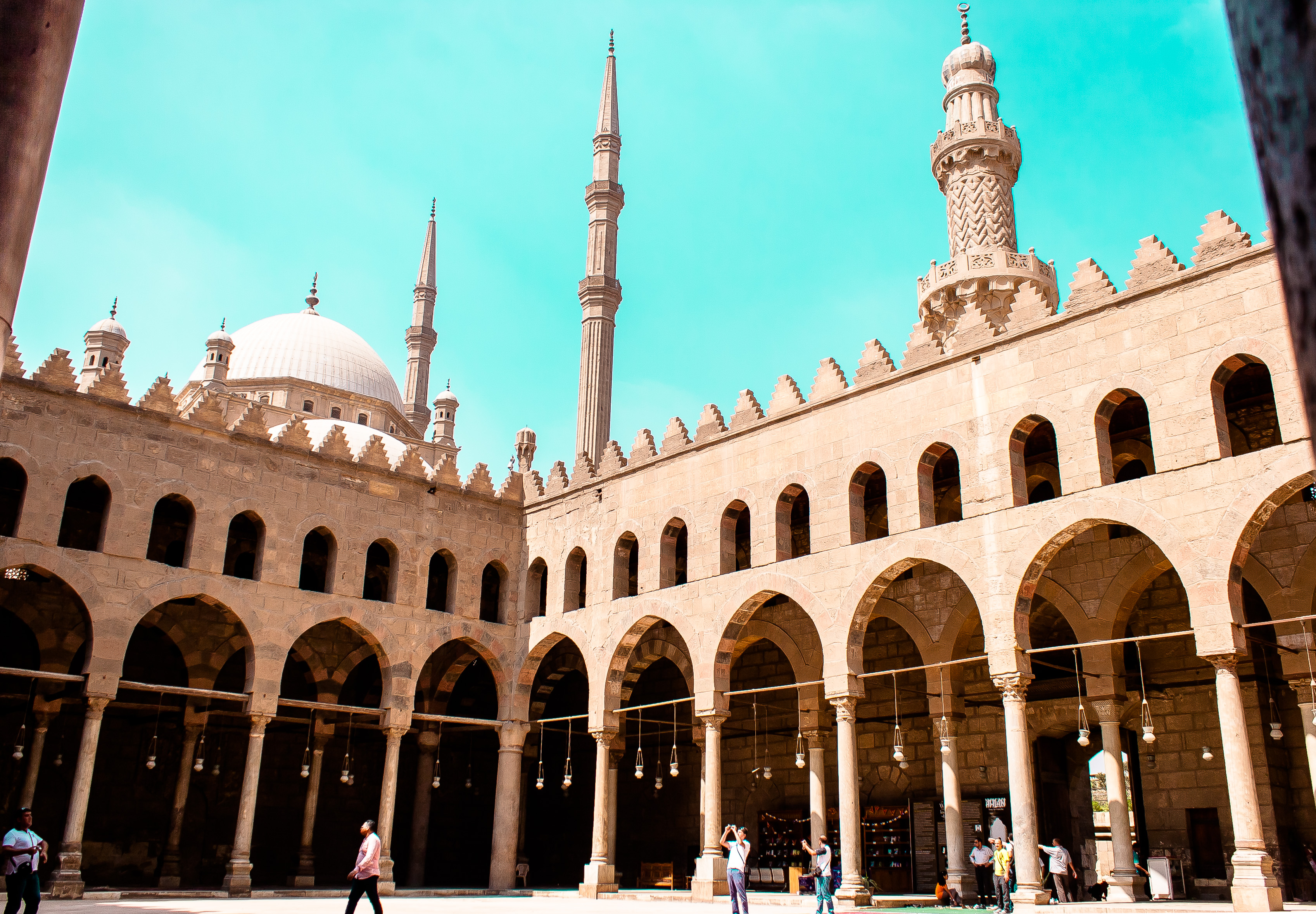 يقع هذا الجامع داخل قلعة صلاح الدين الايوبى ، ويوجد هذا المسجد على يسار الصاعد إلى جامع محمد على باشا الكبير . معلومات عن المسجد قد أمر بأنشائة الملك الناصر محمد بن قلاوون سنة 718 هـ / 1318 م ثم رغب فى توسيعه فهدمه وأعاد بناءة فى سنة 735 هـ / 1335 م . وتبلغ مساحة الجامع من الداخل 59 متر طولا × 53 متر عرضا ويعد تخطيطه من التخطيط الأول للمساجد فهو مربع الشكل يتكون من أربعة صفوف من العقود بينما تشتمل كل من الأروقة الثلاثة الأخرى على صفين من العقود ترتكز جميعها على أعمدة رخامية مختلقة الإحجام متنوعة التيجان وفتح فى خواصرها فتحات معقودة أعلى العقدة قصد بها التخفيف ، ويعلو وجهات الأروقة المشرفة على الصحن شرفات مسننة تنتهي عند كل ركن من أركانها الصحن بخوذة مضلعة محمولة على قاعدة مقرنصة . وتقوم أمام المحارب قبة أنشئت سنة 1935 م وحلت محل القبة القديمة سقطت فى وقت غير معلوم وترتكز هذه القبة على مربع بأركانه الأربعة مقرنصات كبيرة من الخشب وبأسفلها طراز خشبي مكتوب به بالخط البارز الكبير اسم الناصر محمد وتاريخ الإنشاء سنة 735 هـ ، وهذه القبة بقاعدتها محمولة على عقود مرتفعة تحملها عشرة أعمدة ضخمة من الجرانيت الأحمر . أما سقف الجامع فهو من الخشب على هيئة قصع كروية تحيط بها أشكال هندسية تحصر بينها نهود بارزة تكون فى مجموعها منظرا خلابا وقد ظهر هذا النوع من الأسقف فى الدولة الأيوبية ثم أنتشر انتشارا واسعا فى عهدي قلاوون وابنه الناصر محمد سواء بمصر او بفلسطين وقد قامت إدارة حفظ الآثار العربية بتجديد هذا السقف . وتدل بعض بقايا الرخام التي وجدت بالمحراب على أنة كان مكسوا بالرخام الملون المدقوق بزخارف دقيقة كما تدل مواضع لصق الرخام التي مازلت باقية حتى الآن على جدران الجامع الداخلية على أنها كانت مكسوة بوزرة رخامية جميلة بارتفاع أكثر من خمسة أمتار .